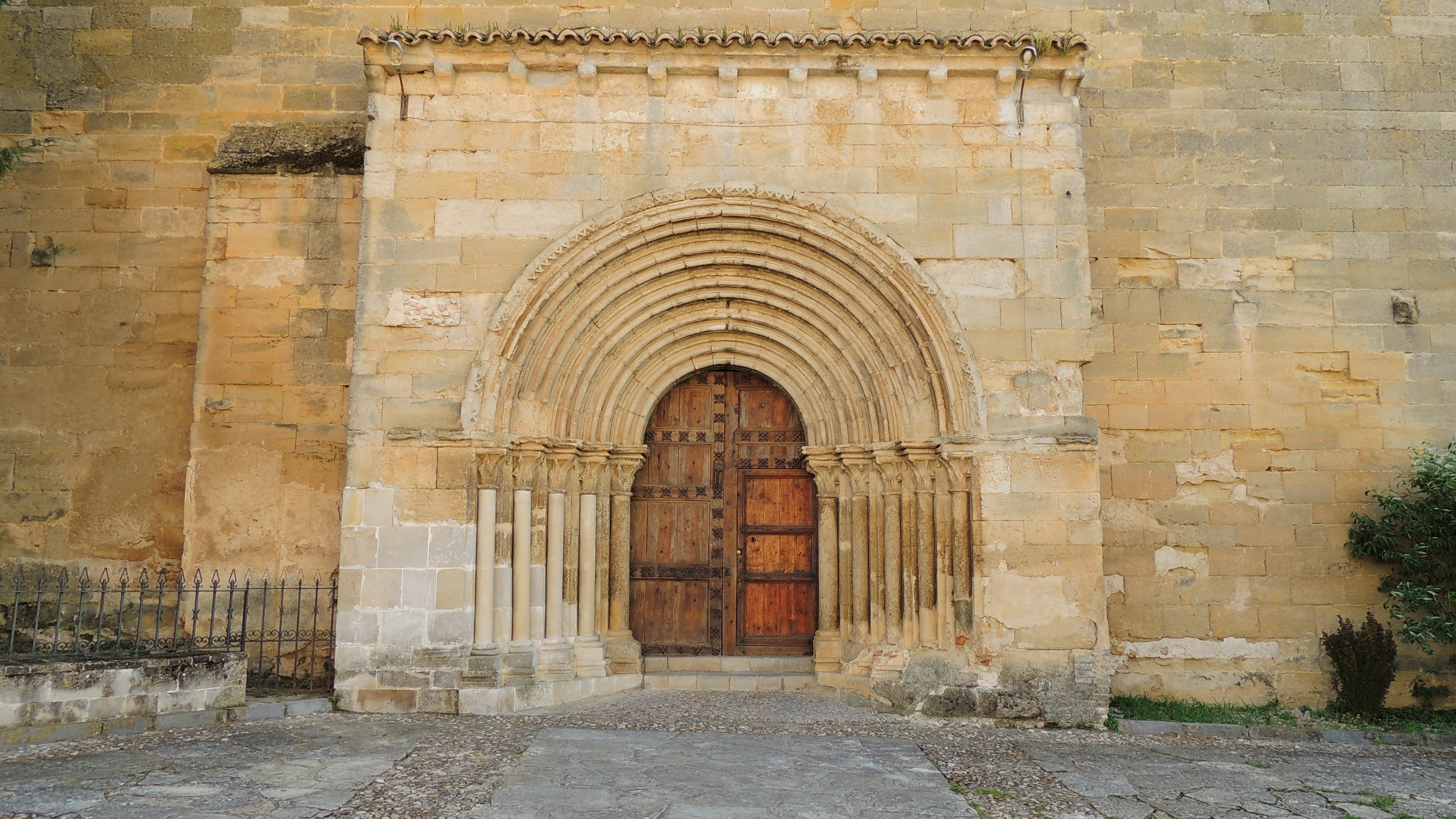 Portada